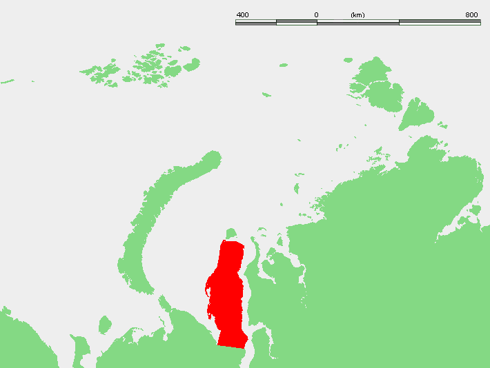 Nordensjelda Islands